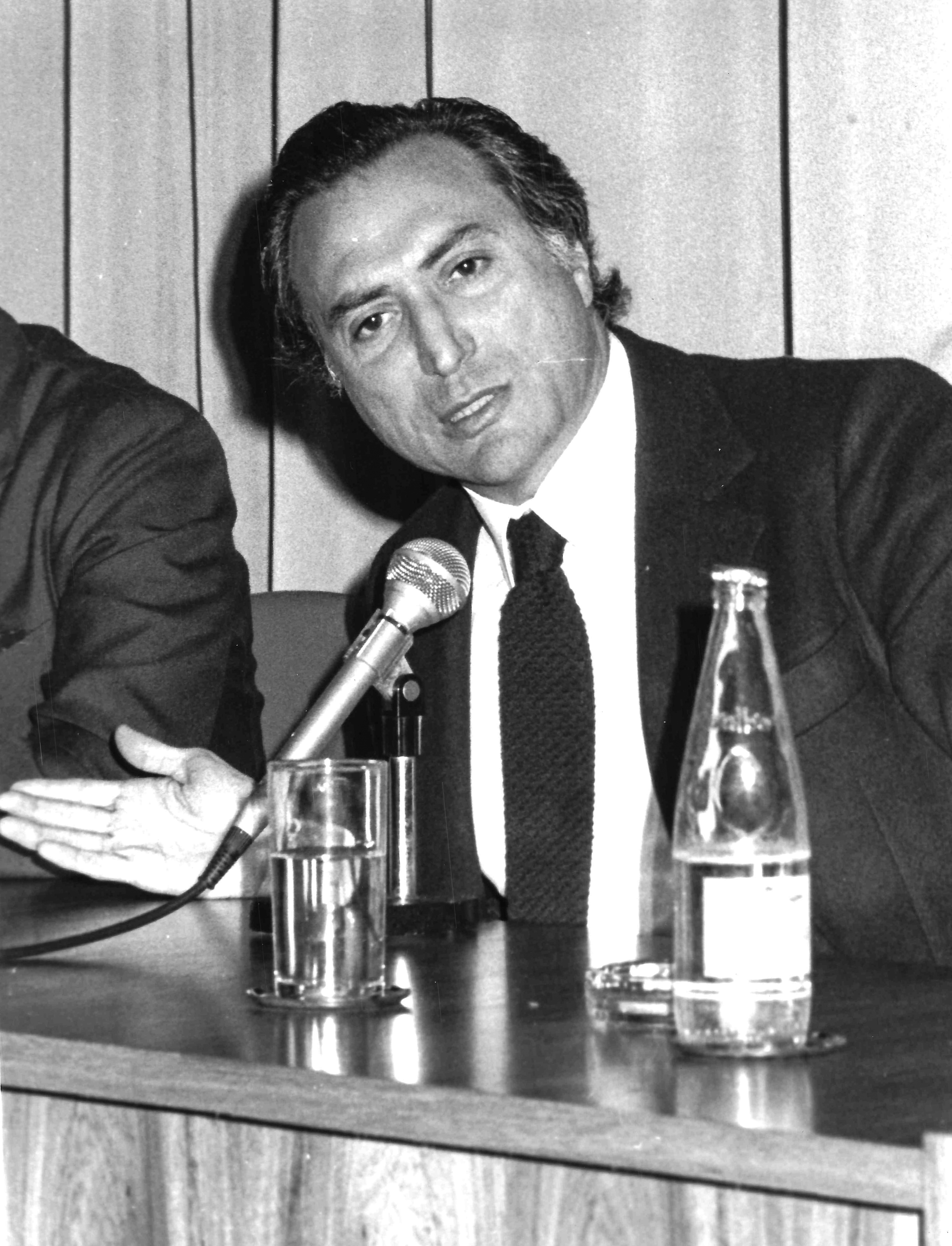 Foto de época de Michel Temer disponibilizado por sua assessoria. Data precisa não informada.